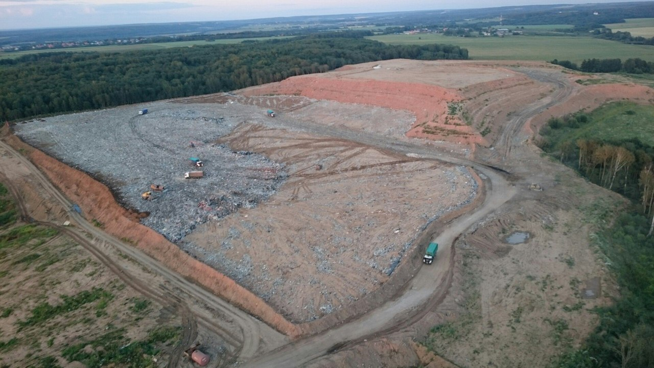 Свалка мусора «Алексинский карьер» в черте городского поселения Клин, август 2017 года.